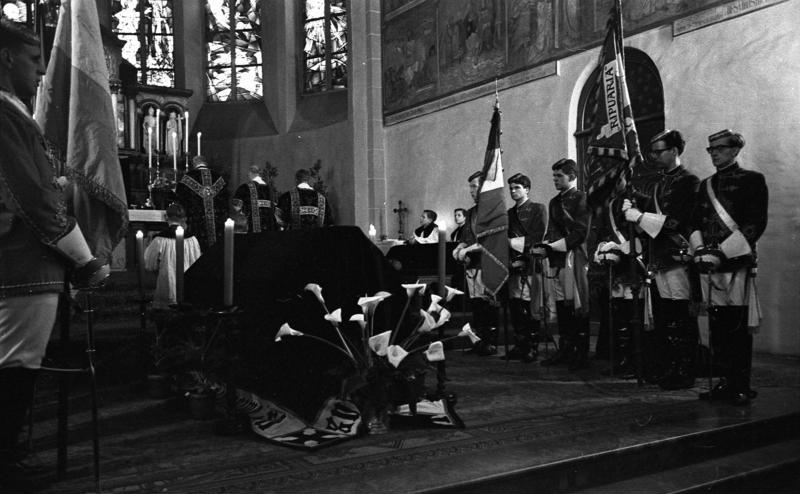 Requiem für den verstorbenen Bonner Polizeipräsidenten Dr. Wilhelm Tegethoff Bonn, Münsterkirche